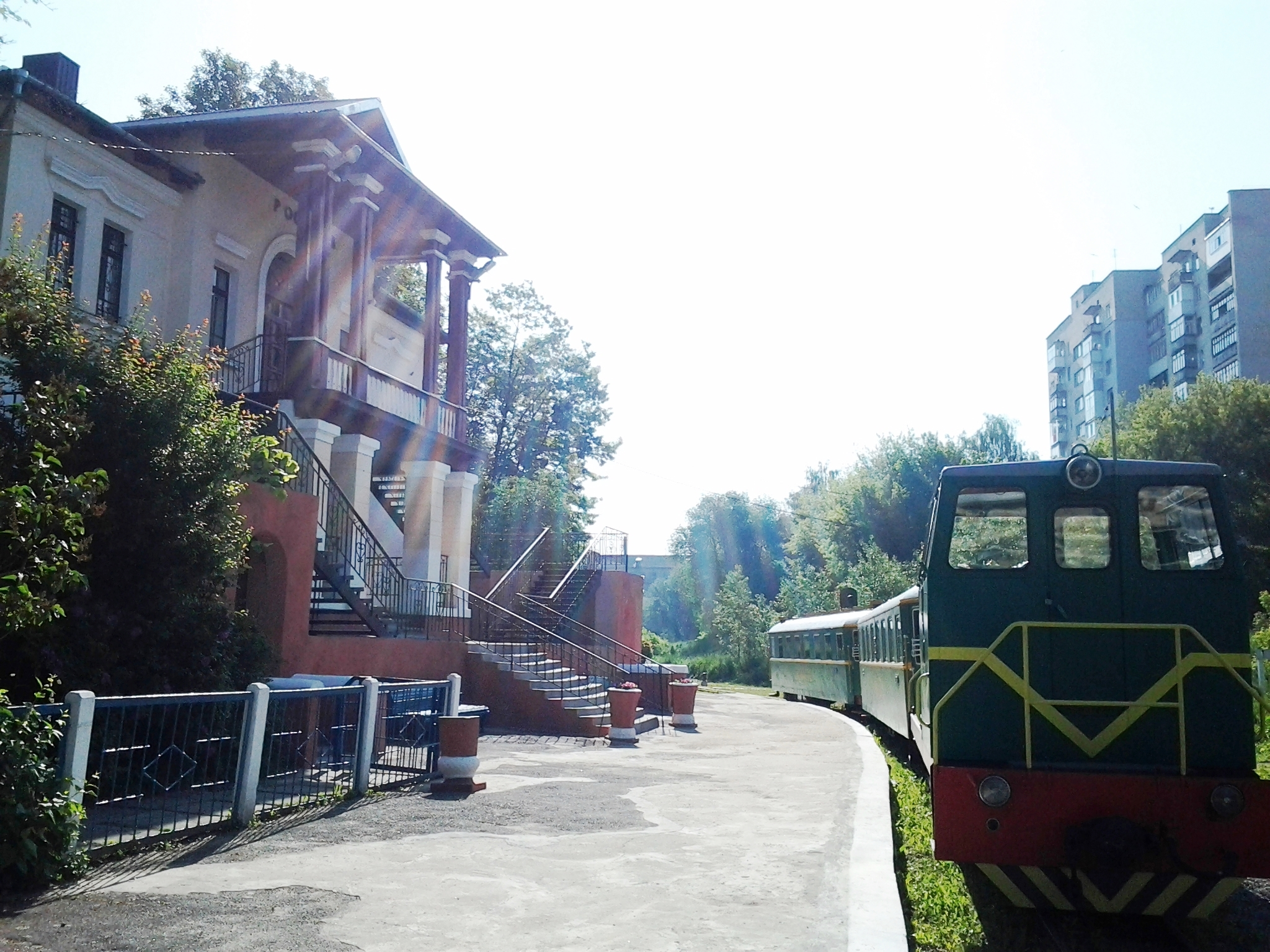 Луцька дитяча залізниця, 2016 рік